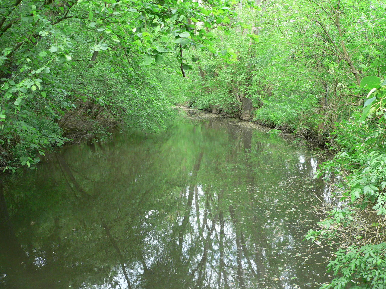 Der Fluss "Wetter" bei Lich, Hessen, Germany